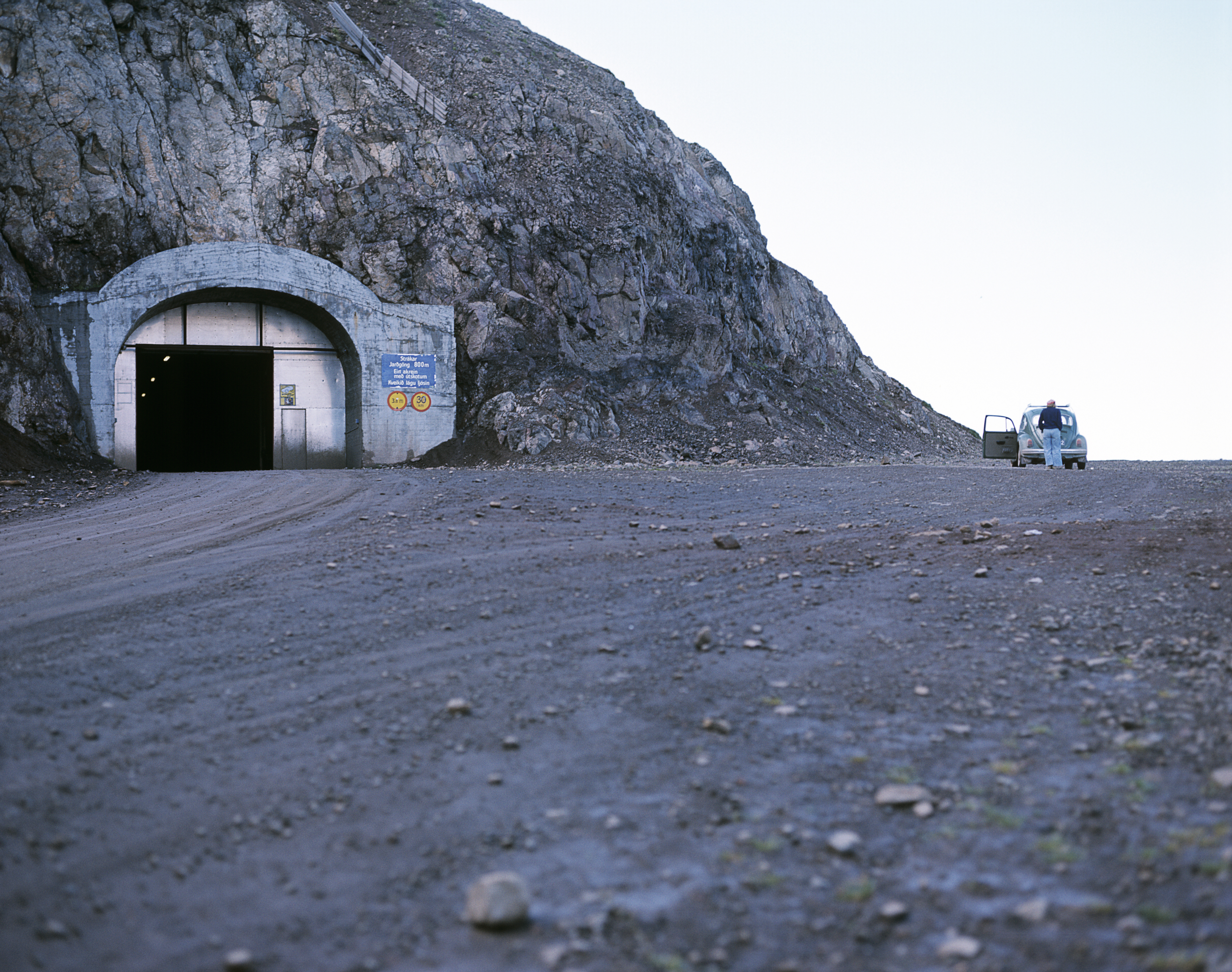 Tunnel „Strákar_jarðgöng“ auf der Straße nach Siglufjörður durch den Berg „Strákar“.